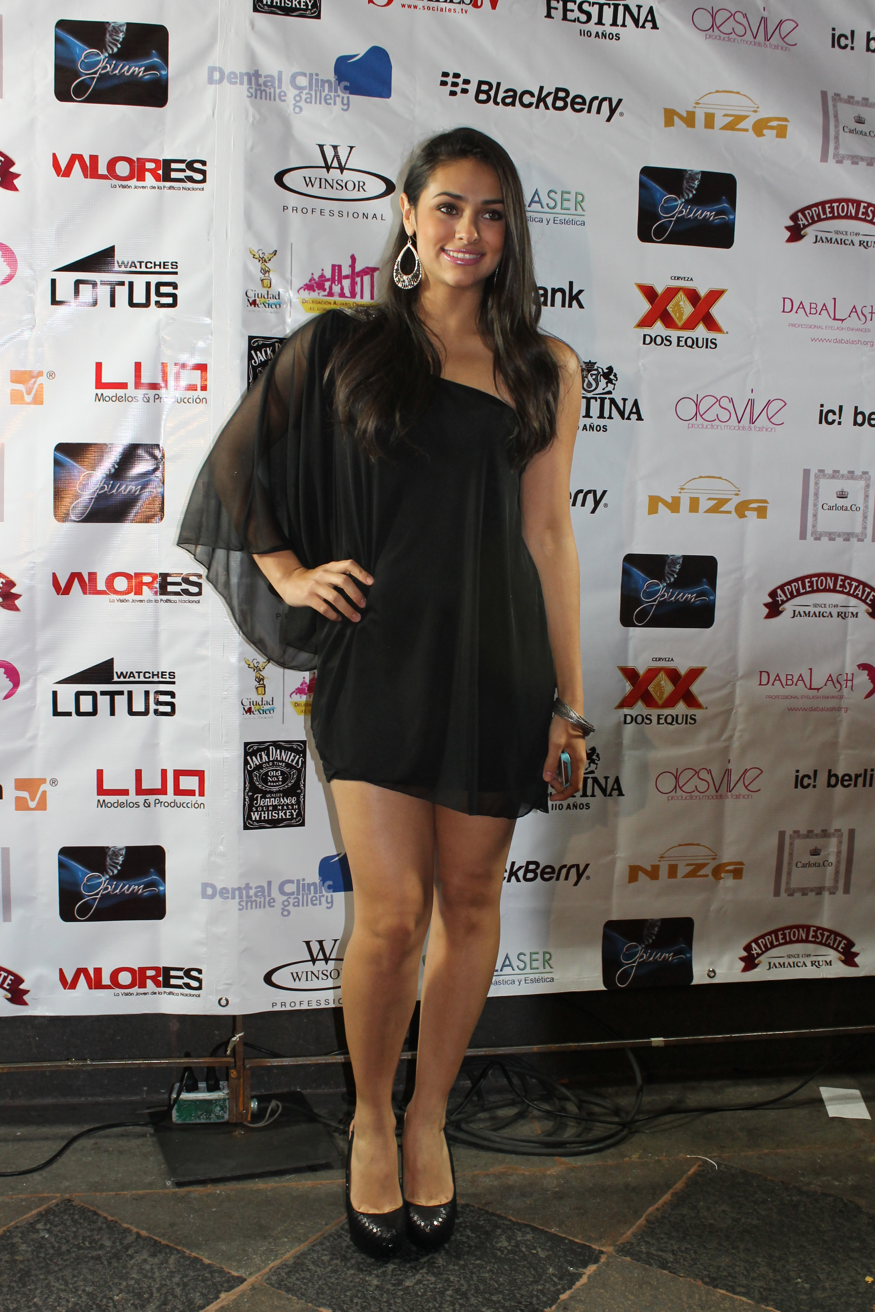 Cocktail de la moda 2012 Renata Notni *Foto cortesia de G7Magazine.MX